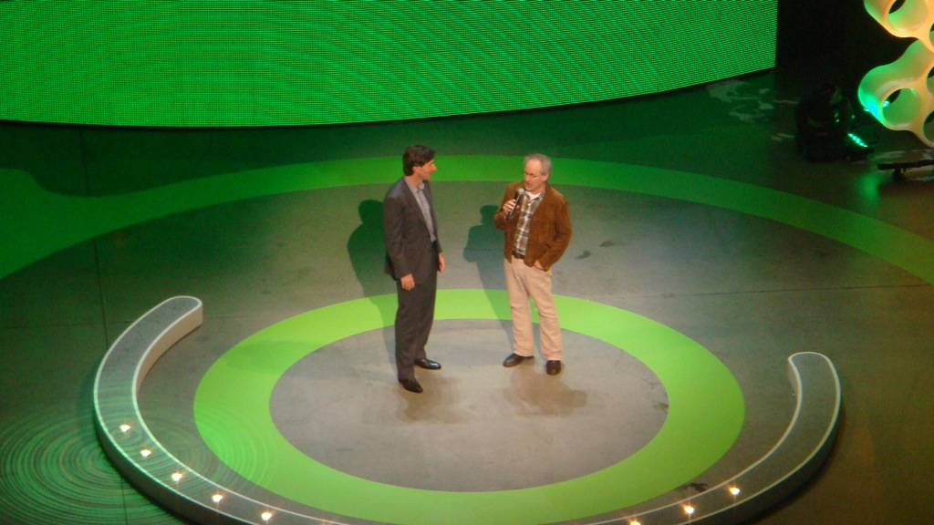 Steven Spielberg - E3 2009